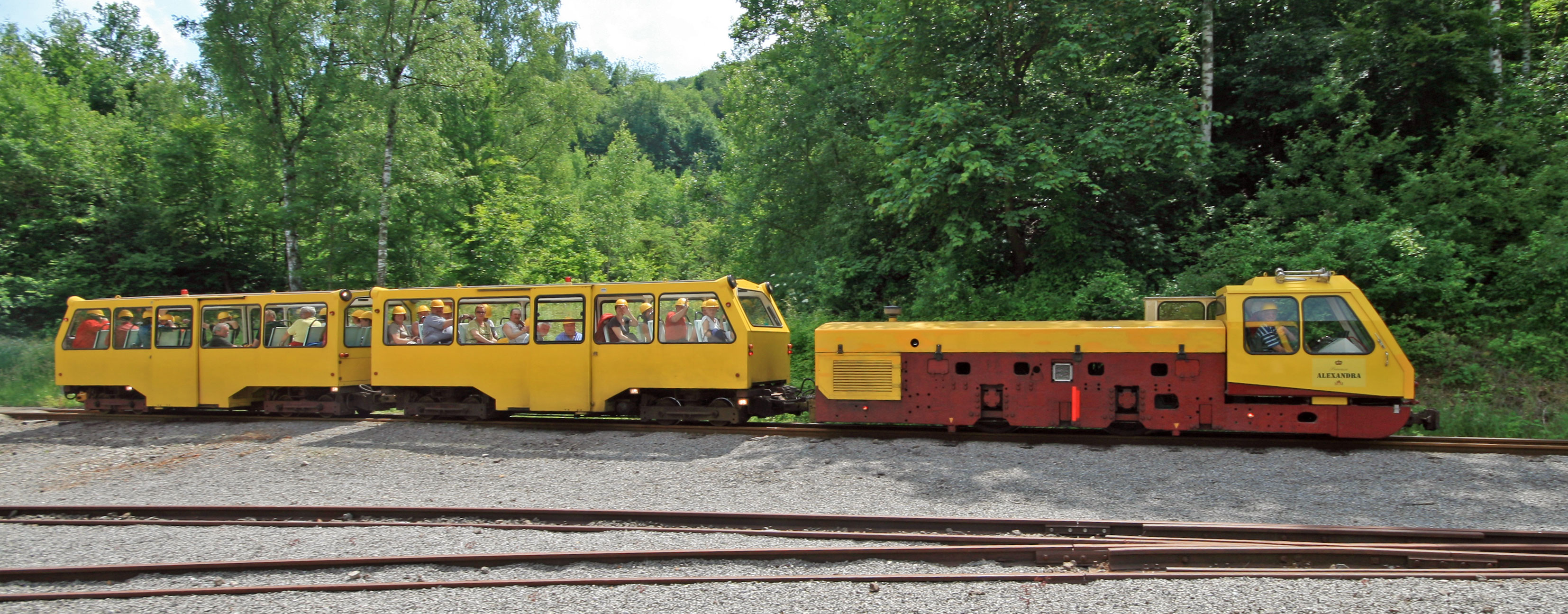 De Minèresmuséeszichelchen